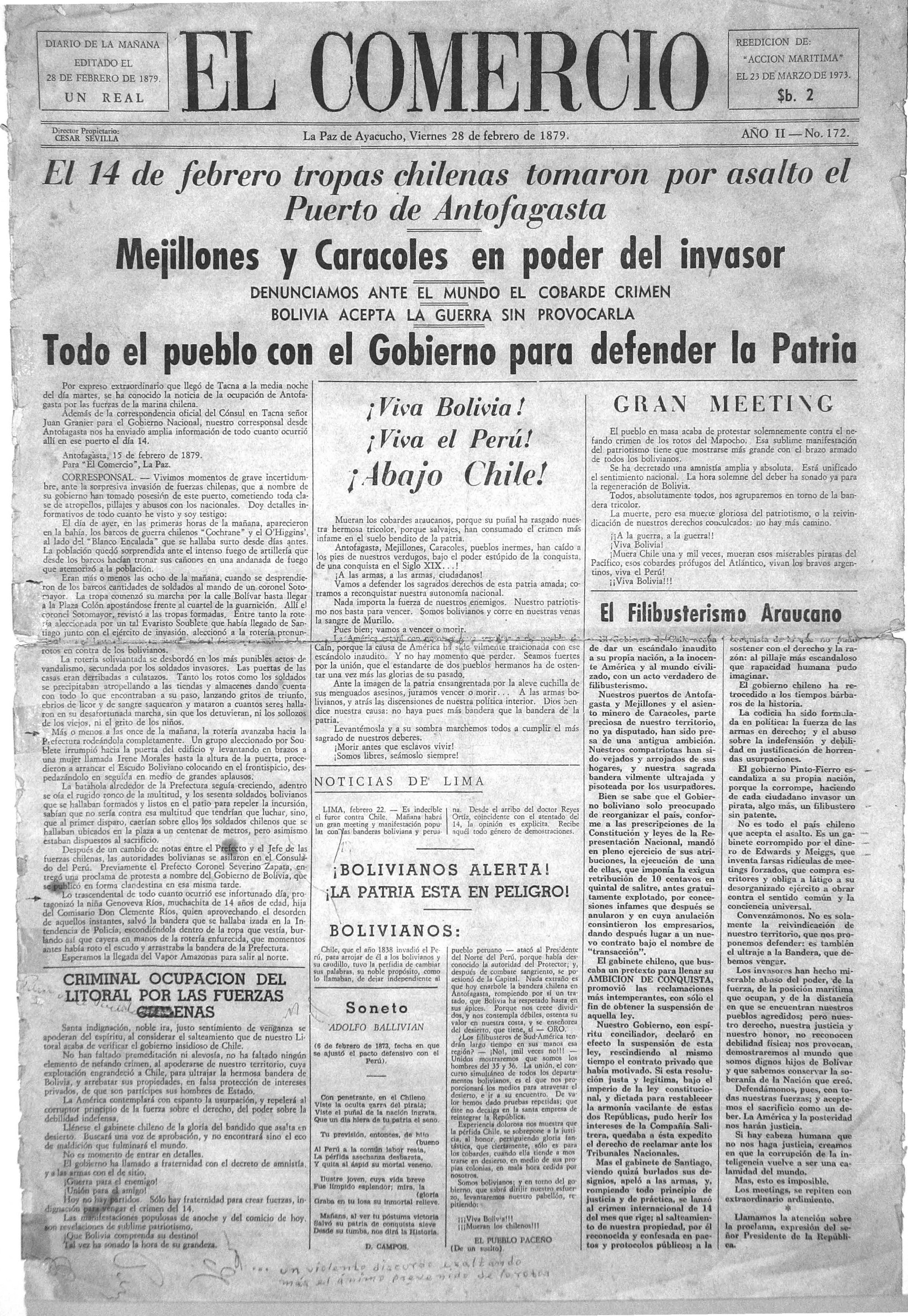 Portada del periódico El Comercio, La Paz 28 de febrero de 1879. Relata la Invasión Chilena del puerto Boliviano de Antofagasta ocurrida el 14 de febrero de 1879 y los actos heróicos de la niña Genoveva Ríos. No es el original, es una reedicion de 1973 (ver arriba a la derecha)